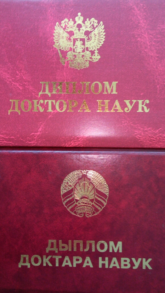 образец диплома доктора наук в РФ и РБ